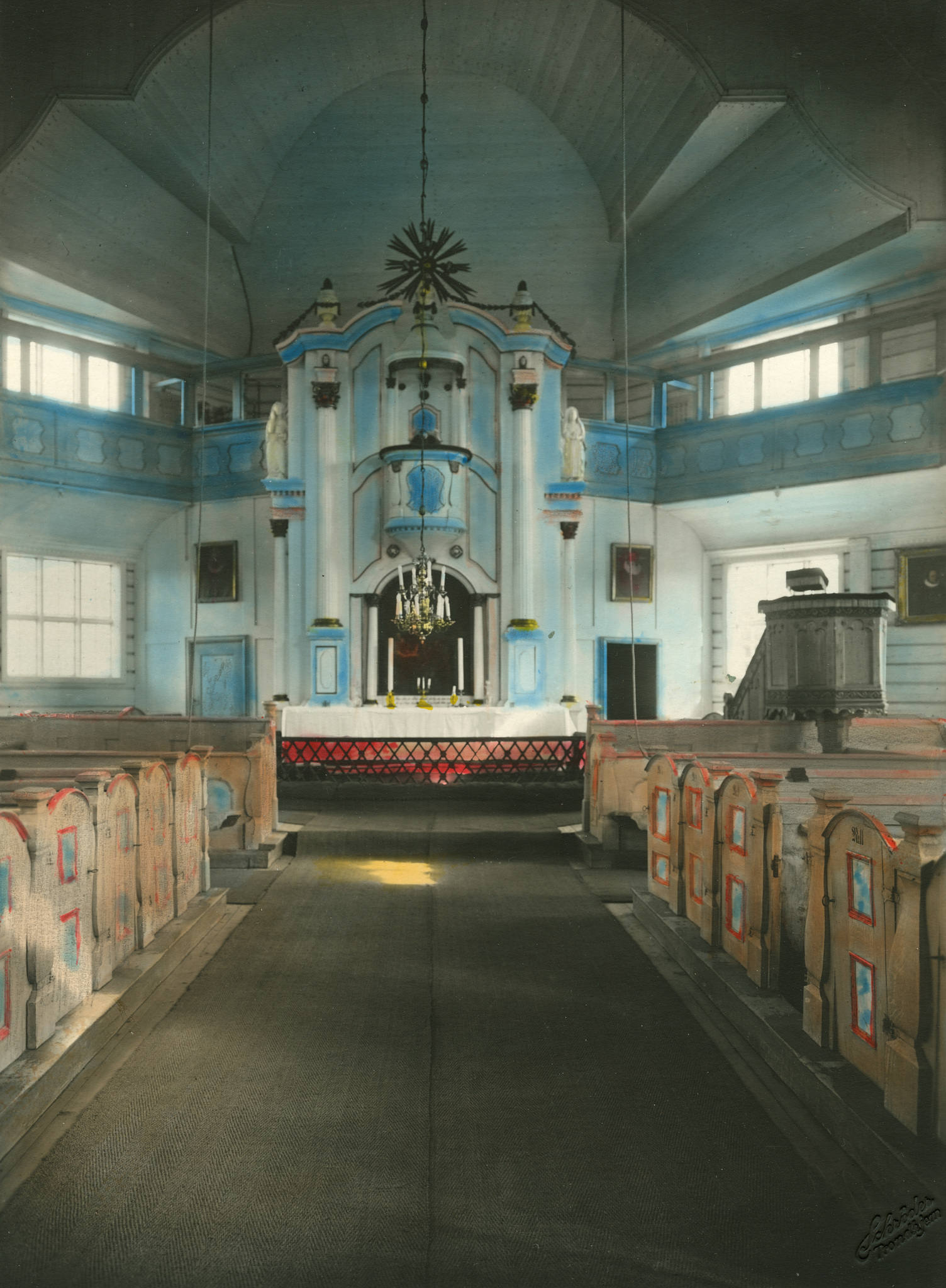 Interiør i Klæbu kirke. Fra Kulturminnebilder.no.